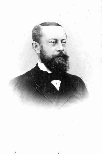 Arnoldus Johannes Andreae (Kollum, 30 jannewaris 1845 - 27 febrewaris 1899), lid fan de Provinsjale Steaten fan Fryslân 1894-1898.